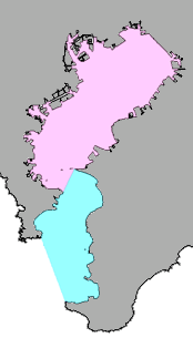 東京湾の範囲。赤い部分が狭義の東京湾（観音崎－富津岬以北）。広義には水色の部分を含む（剣崎－洲崎以北）。